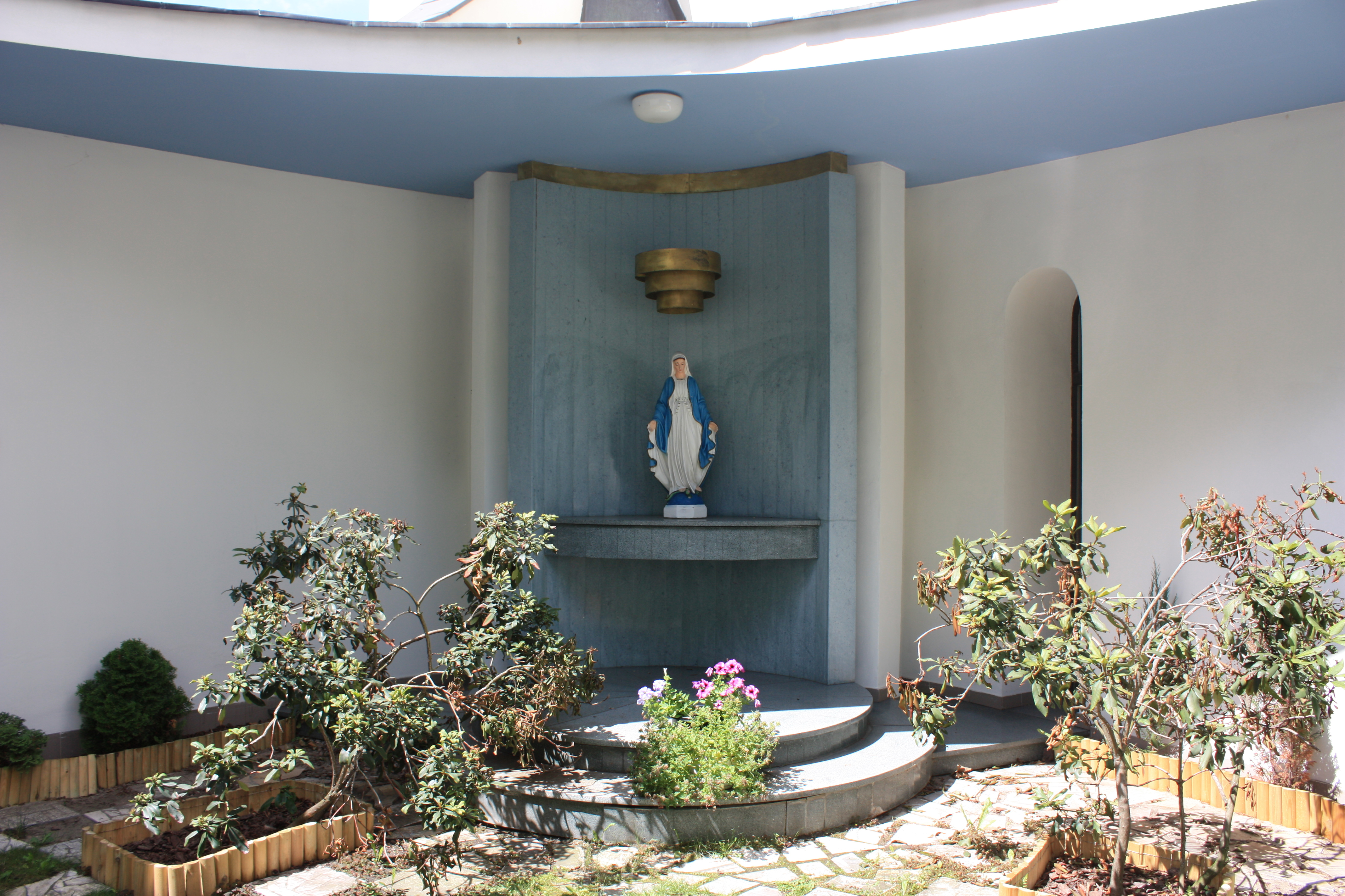 Patio z figurą NMP.